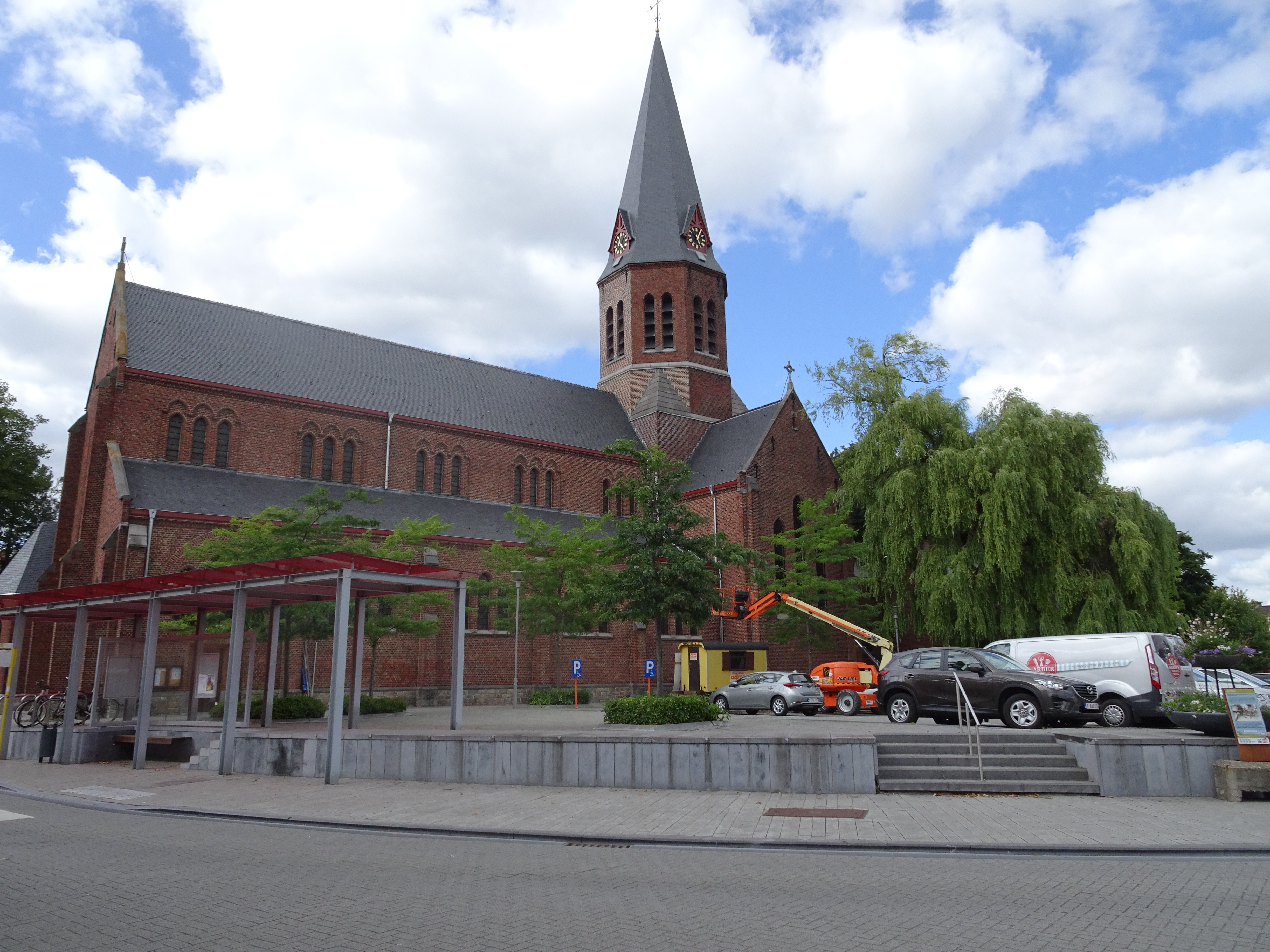 l Marke , Province_de_Flandre-Occidentale.- Belgique